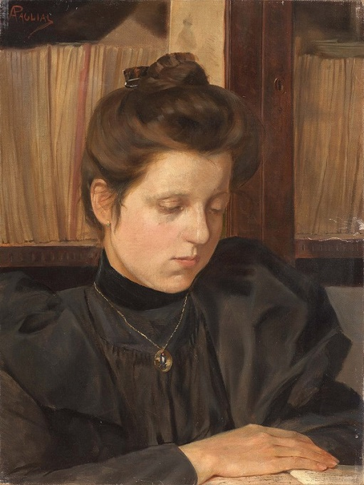 La lettera, olio su tela, cm. 53,5 x 37,5, firmato, coll. privata